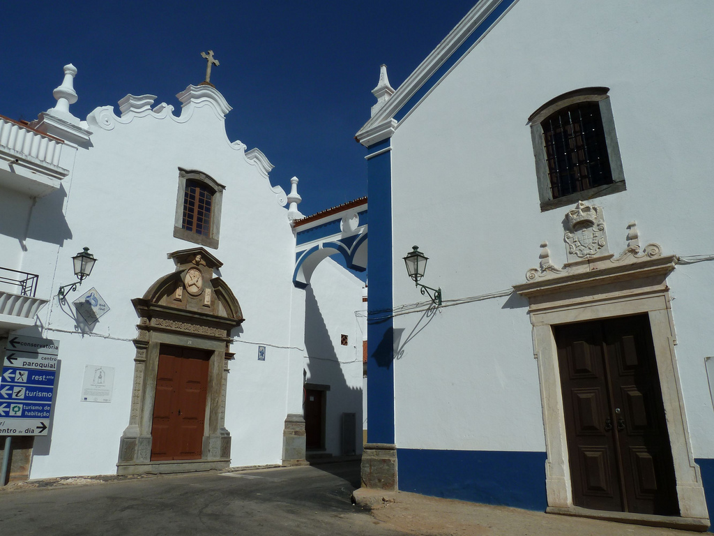 mourao_01